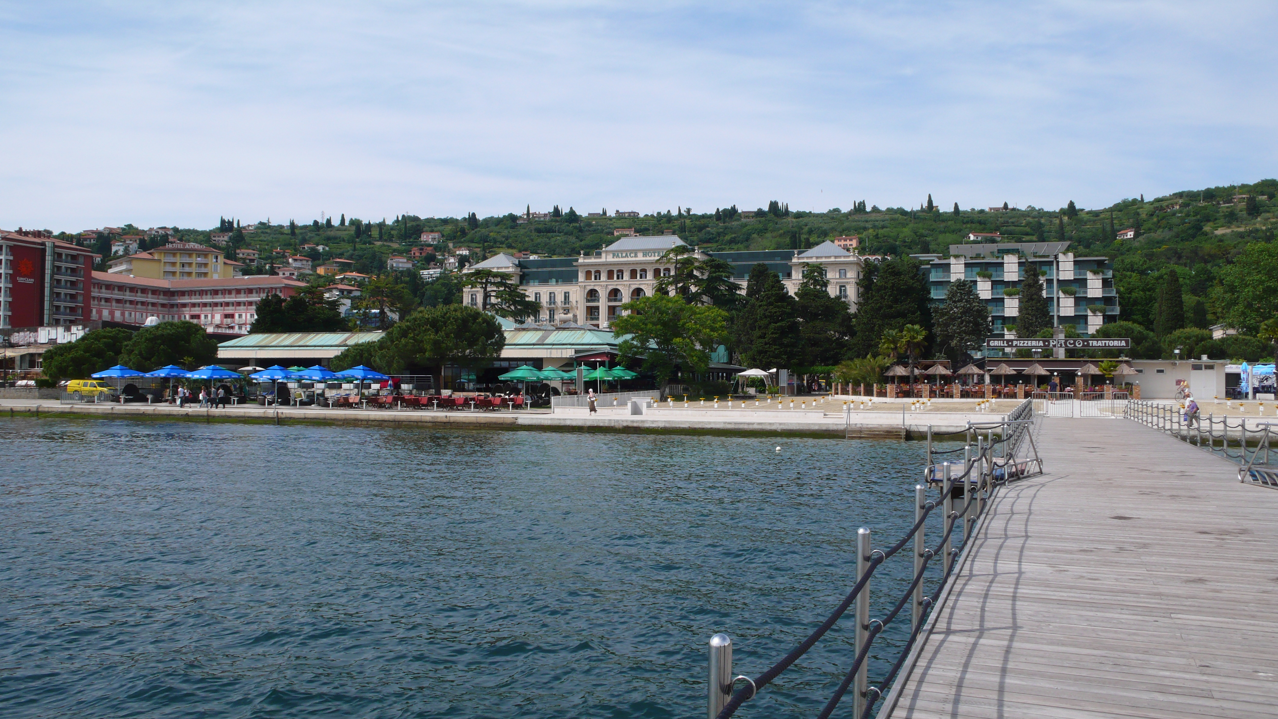 Portorož, Slowenien